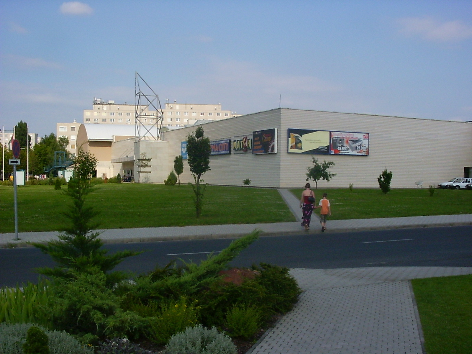 A győri pláza épülete. Cím: Győr, A., Vasvári Pál u. 1